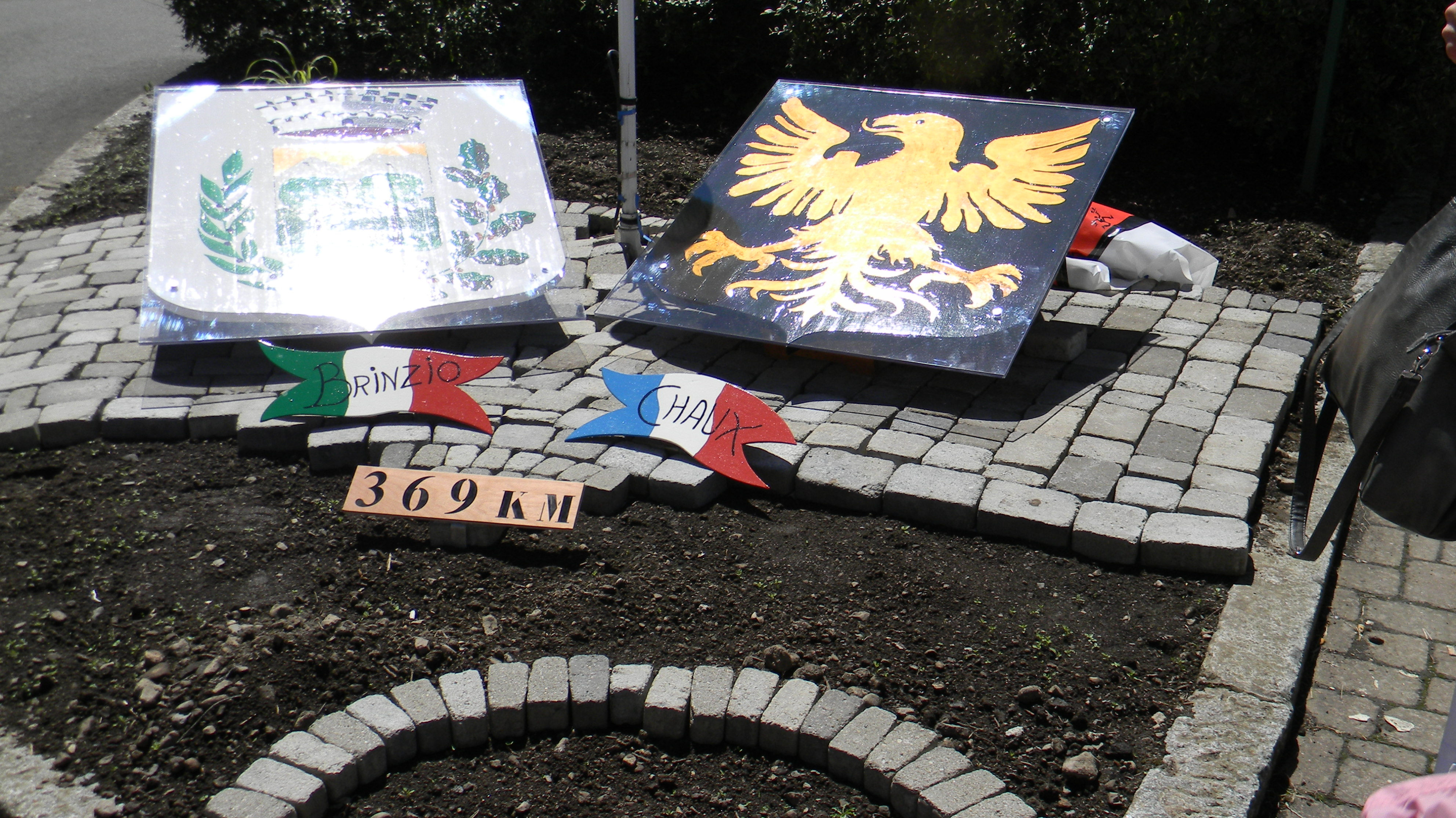 monumento commemorativo del gemellaggio tra i comuni di Brinzio (VA - Italia) e Chaux (Franca Contea - Francia) - maggio 2013